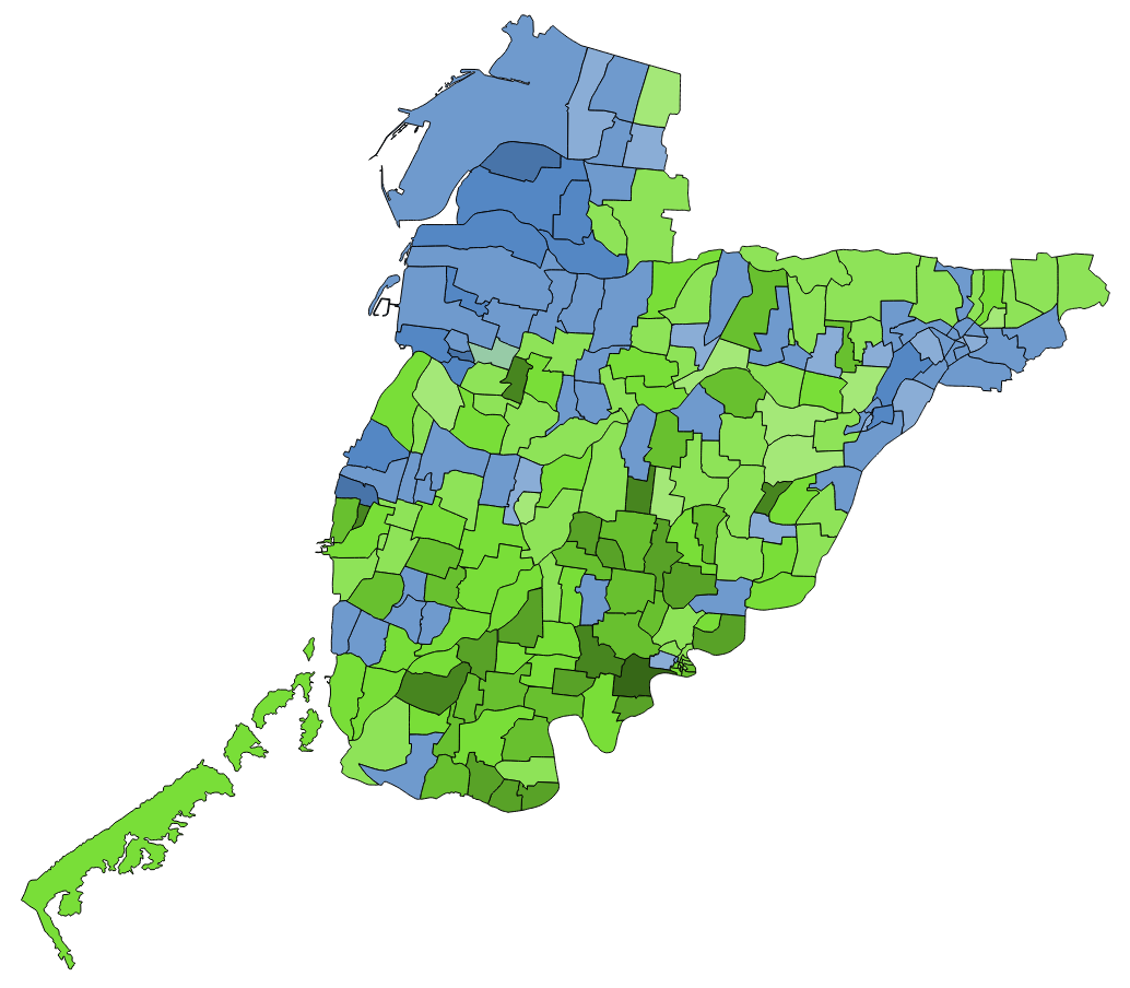 顏色對照表